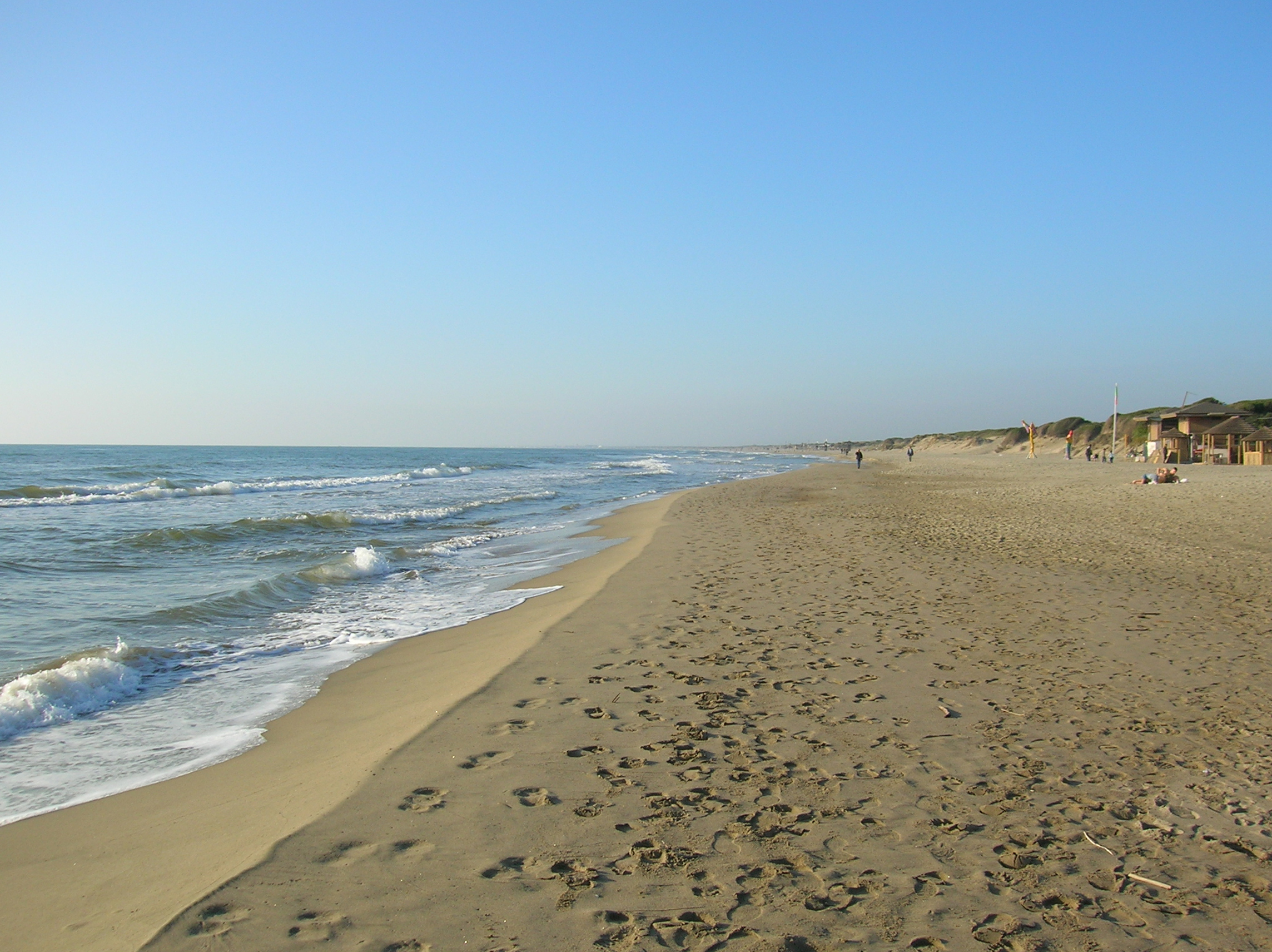 Spiaggia di Capocotta, Riserva naturale Litorale Romano, Ostia, Roma.